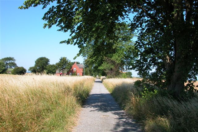 Hjortø